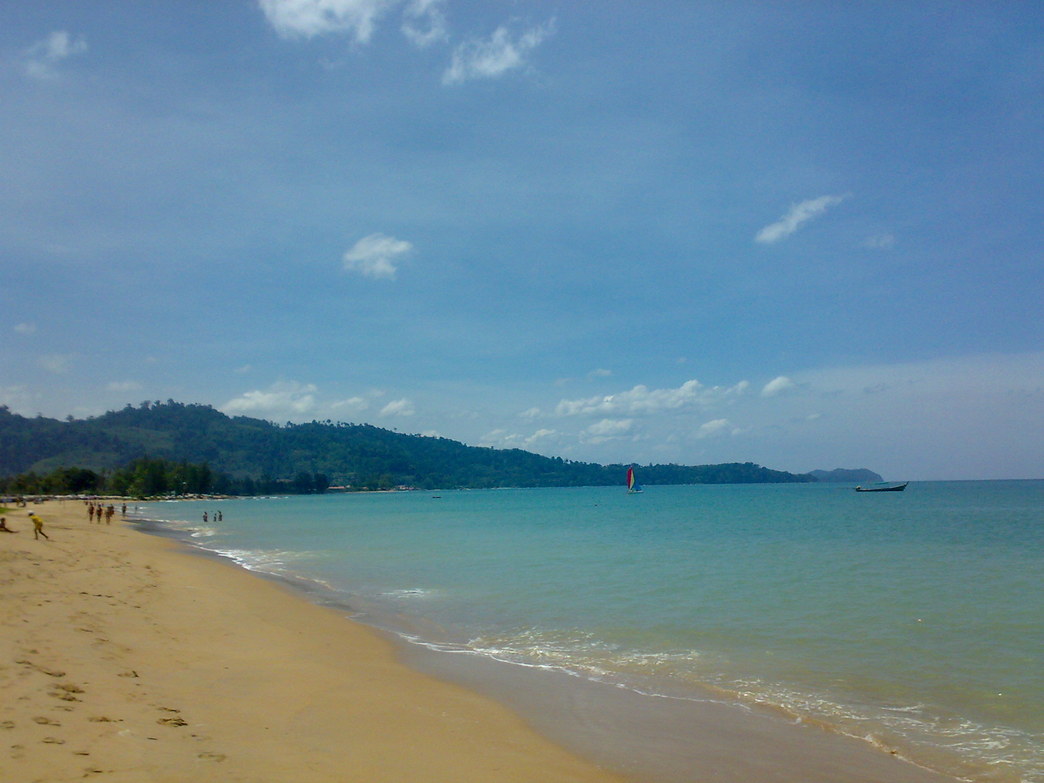 Khuek Khak Beach, Takua Pa, Phang Nga, Thailand